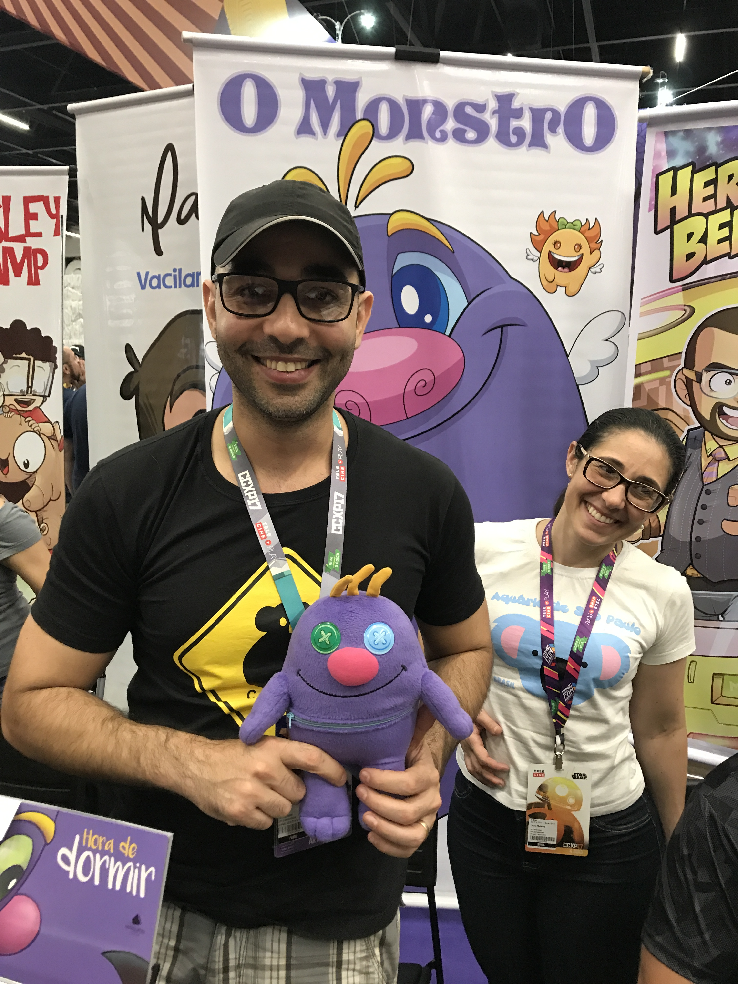 Artista Fabio Coala na edição de 2017 da Comic Con Experience